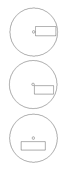 Схема распила древесного ствола при изготовлении гобана